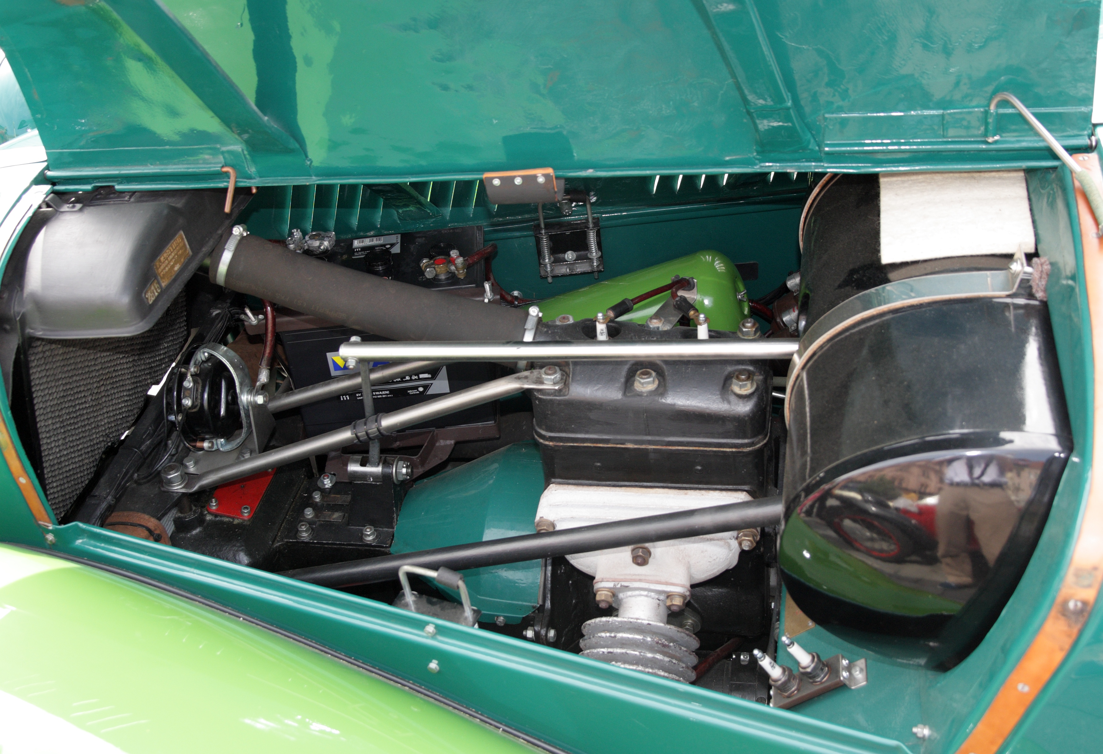 Brno, náměstí Svobody - start XXI. Srazu historických vozidel Vysočina 2014. Aero 30.